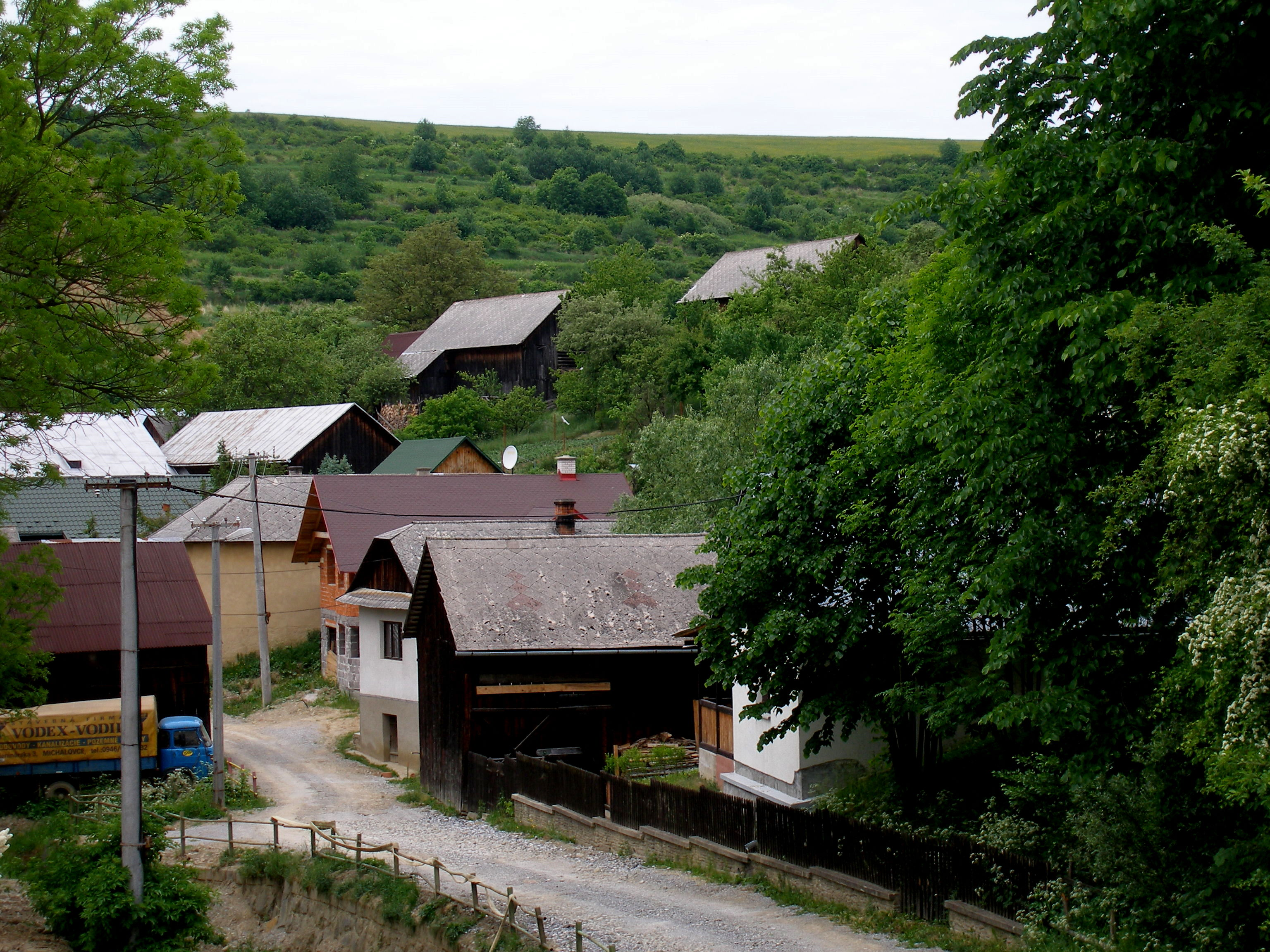 Obec Vysoká okres Sabinov